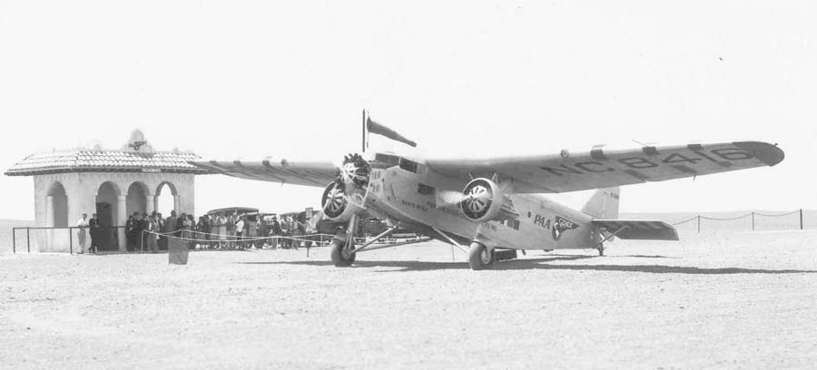 Ford8416panagra